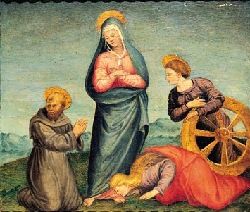 detail